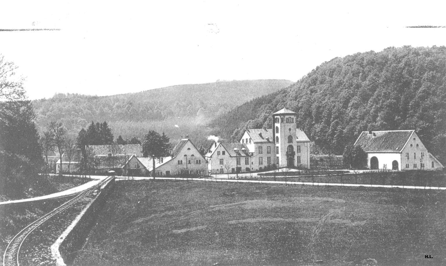 Haus Bamenohl, Ansicht von 1899